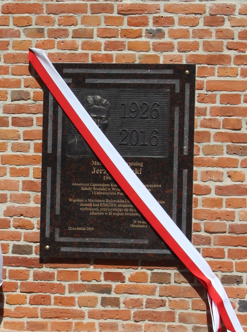 Polski